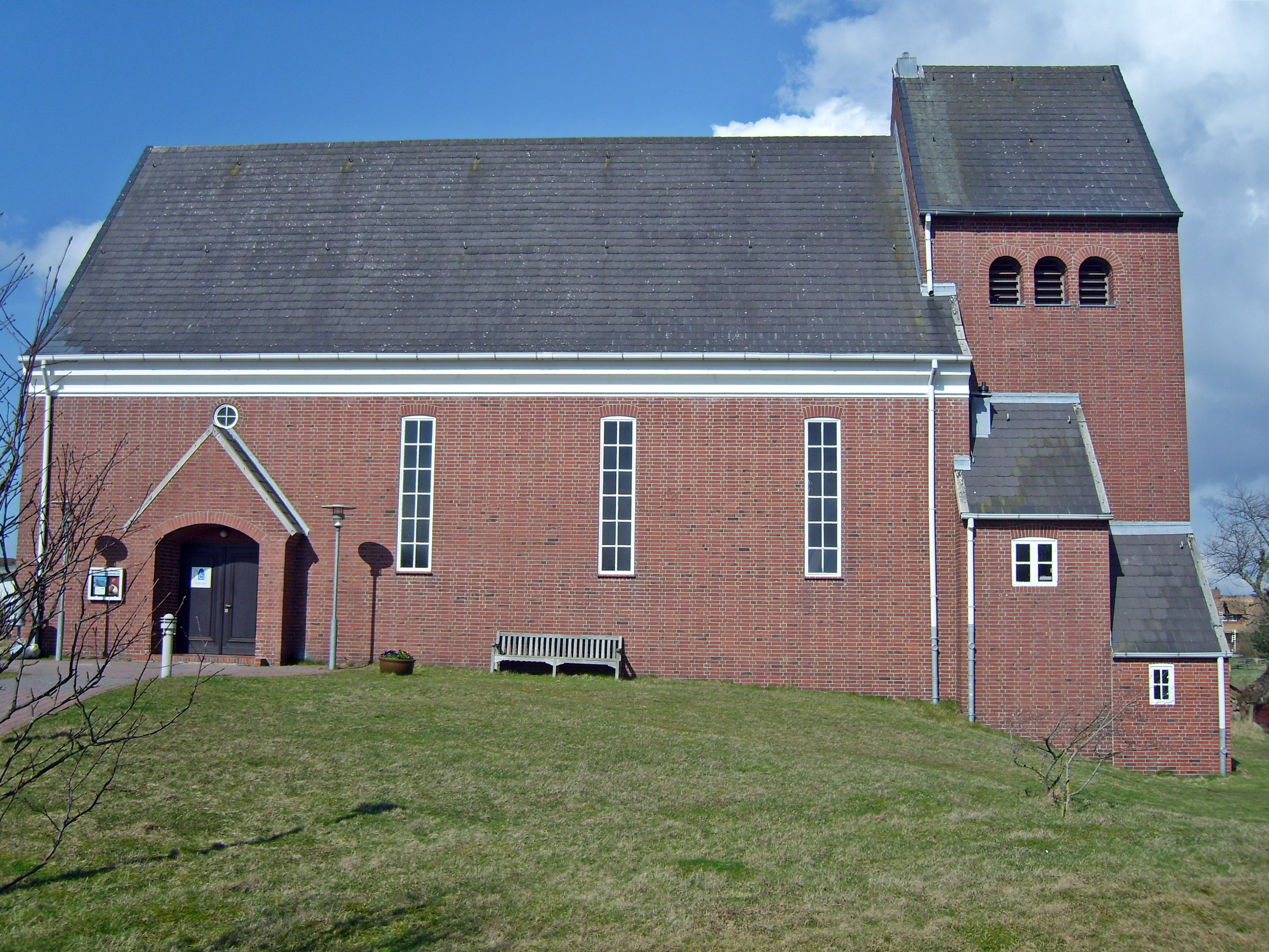 Denkmalgeschützte Kirche St. Jürgen List (Sylt).Außenansicht.